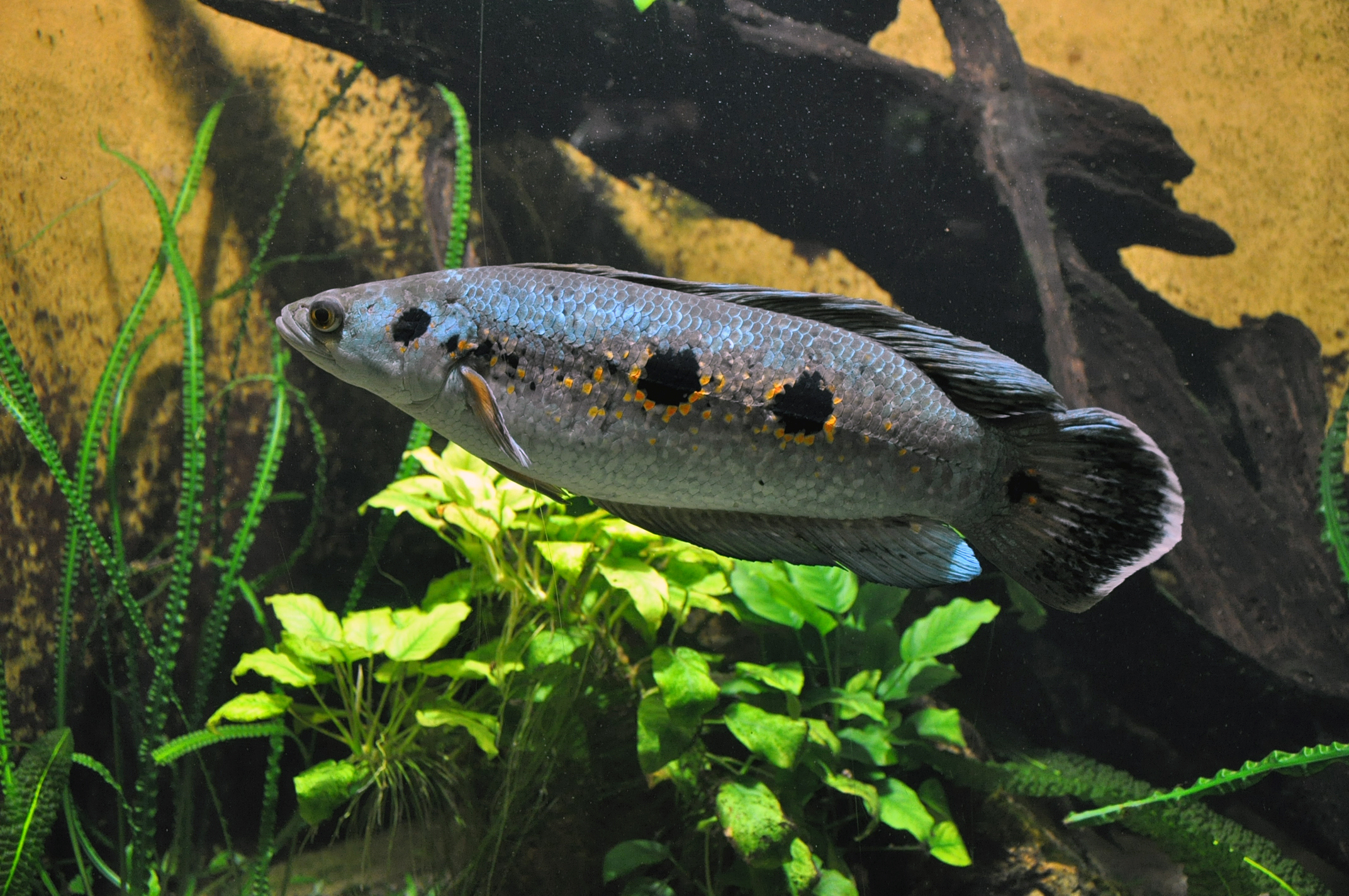 Channa pleurophthalma, Aquazoo Düsseldorf, Heimat: Sumatra, Raubfisch